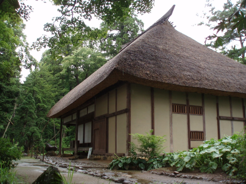 正受庵本堂